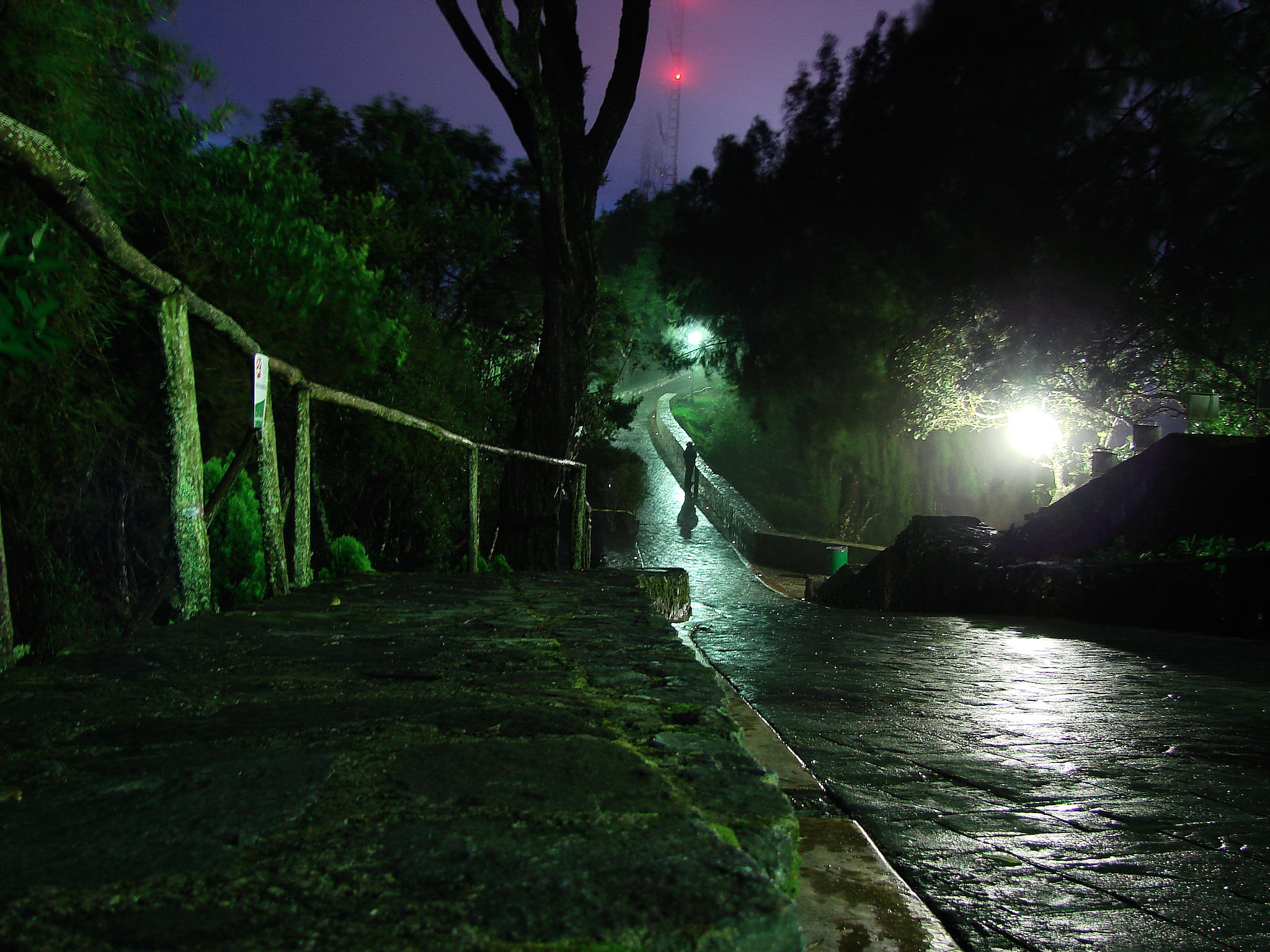 Foto por Rufino Uribe Caminería Ávila Mágica